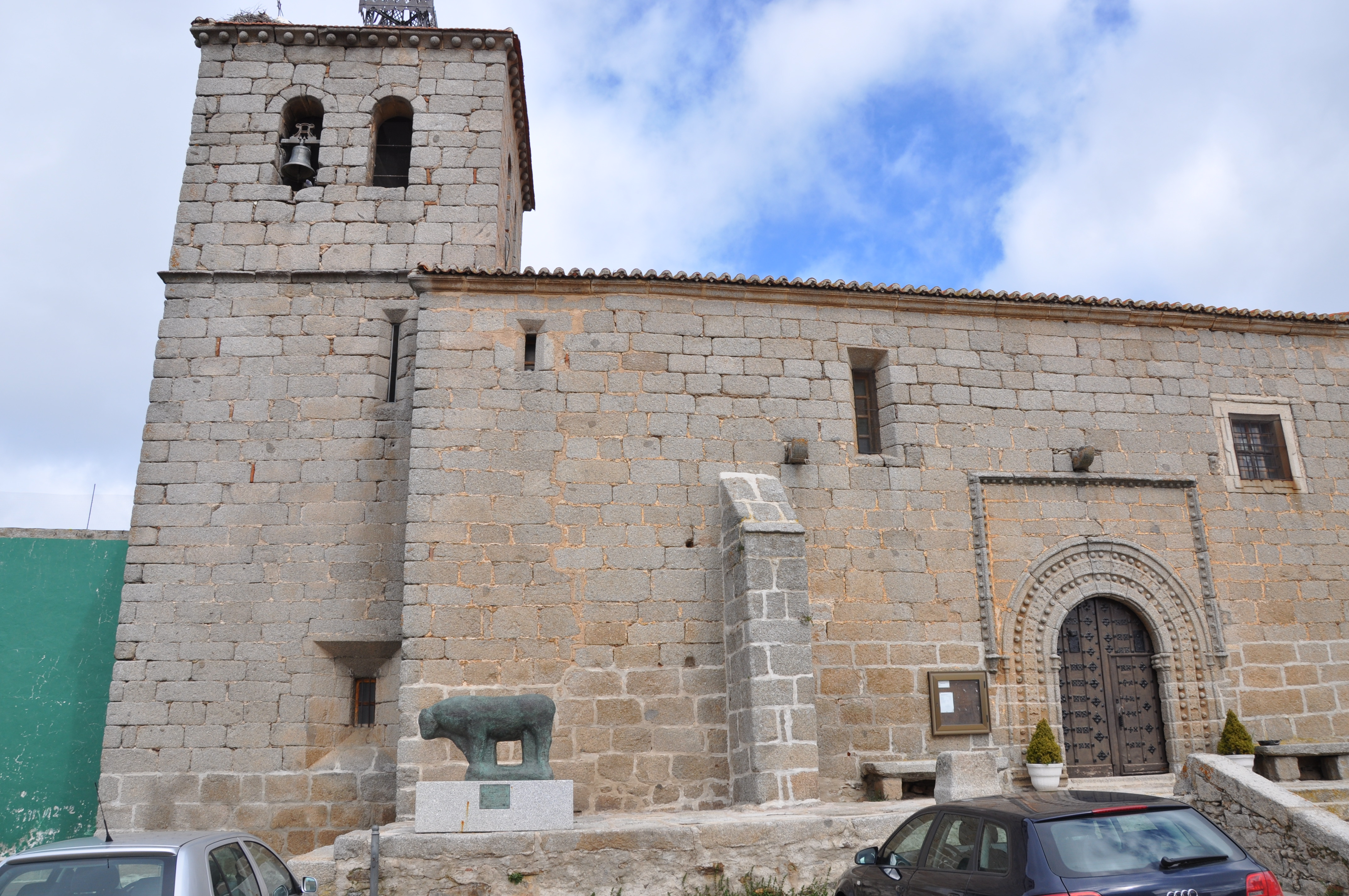 Iglesia parroquial de San Miguel Arcángel, San Miguel de Serrezuela, Ávila, España